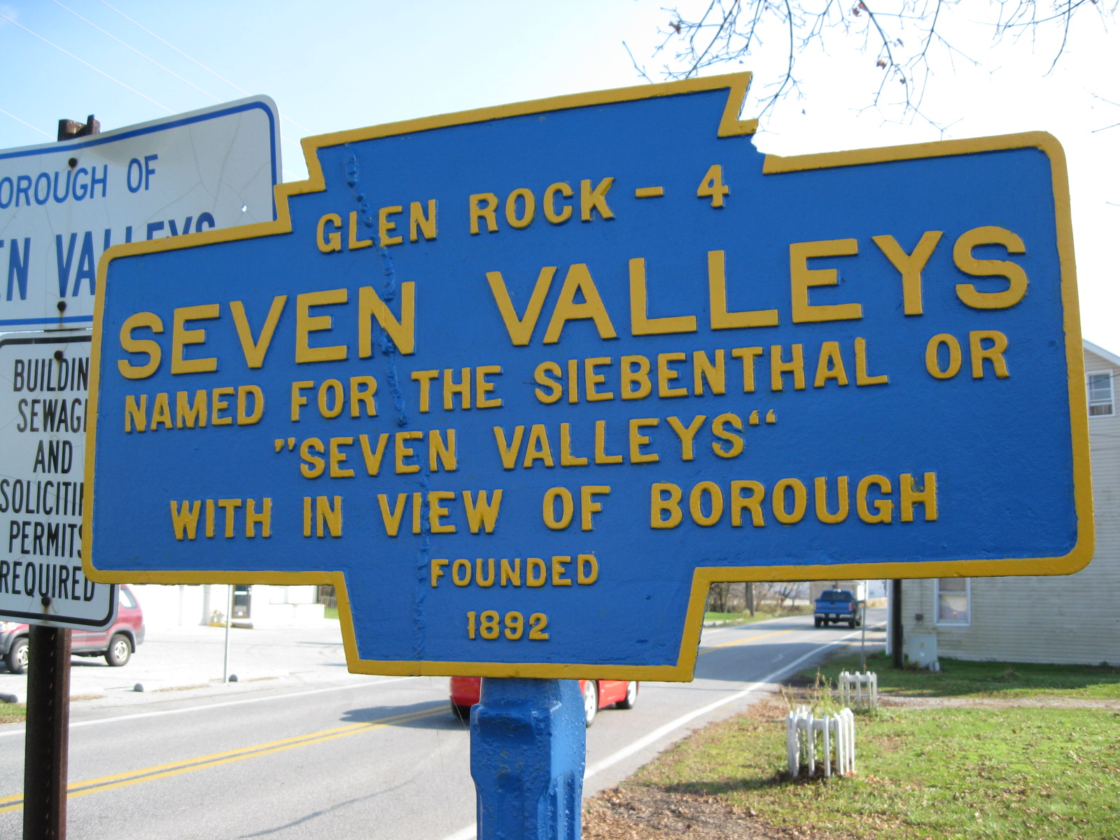 Keystone Marker for Seven Valleys, Pennsylvania